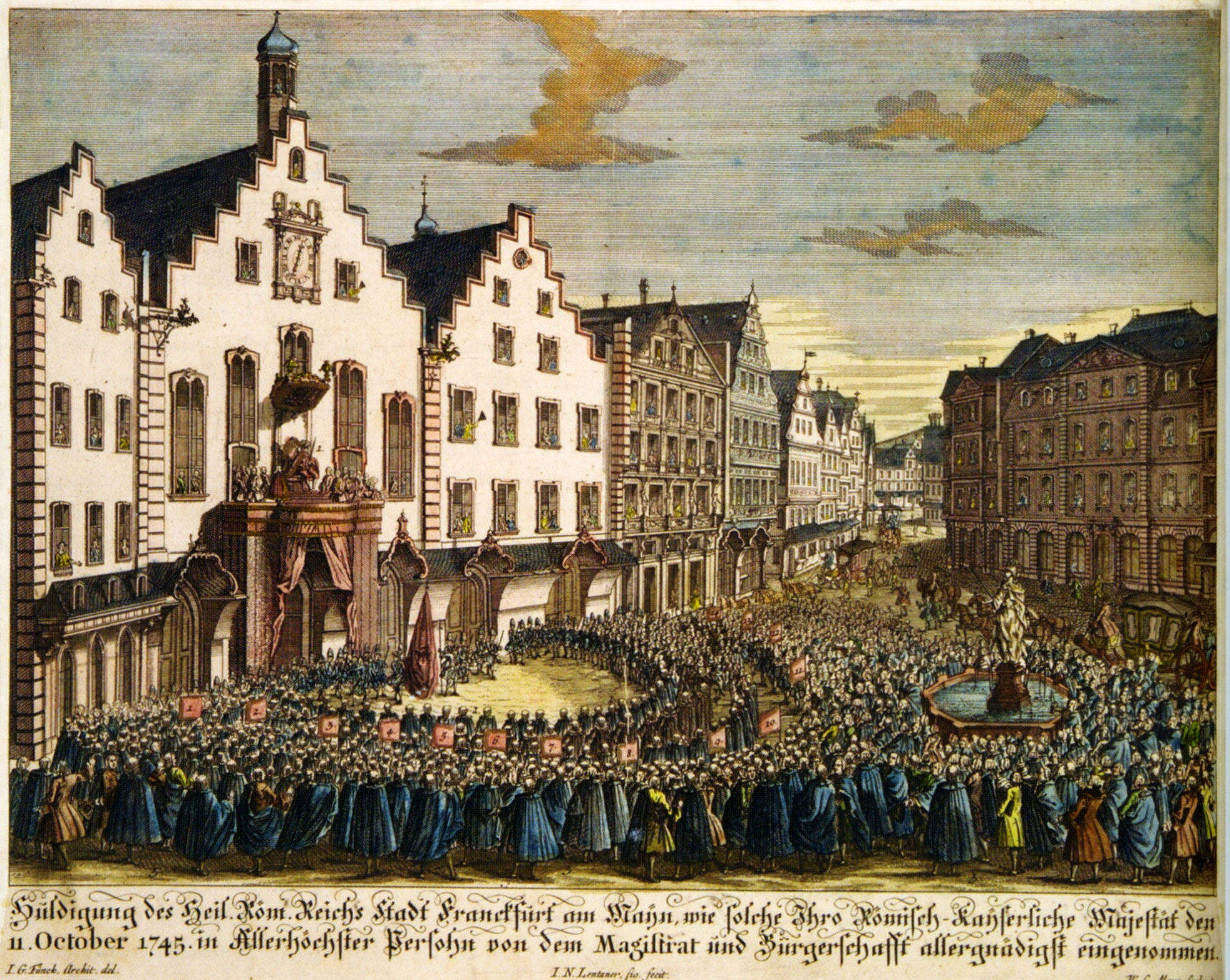 Huldigung der Frankfurter Bürger vor Franz I. anlässlich dessen Wahl zum Kaiser, 1745, kolorierter Kupferstich